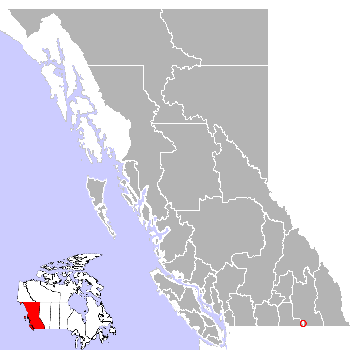 Fruitvale, location.